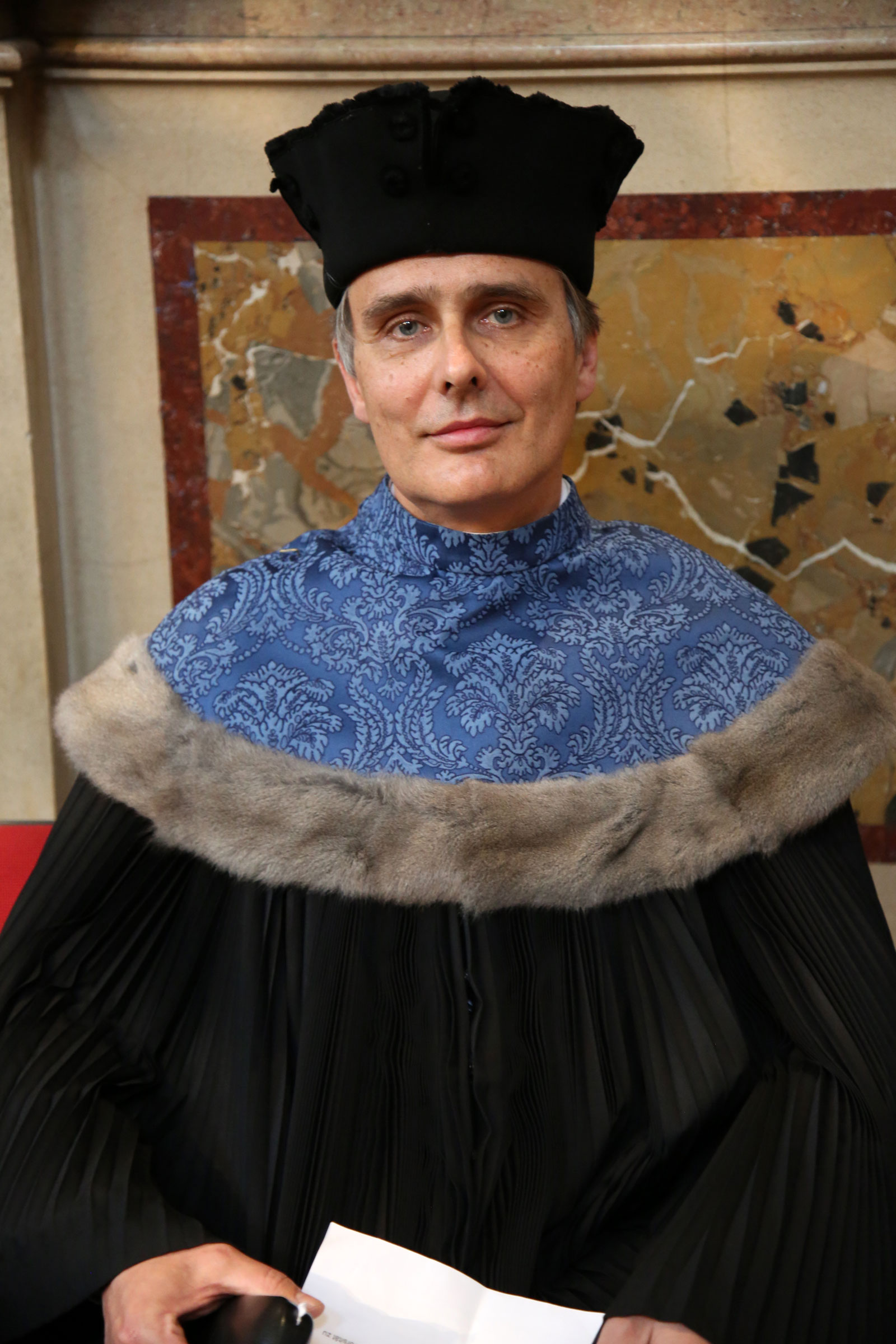 Becker_Peter-1397